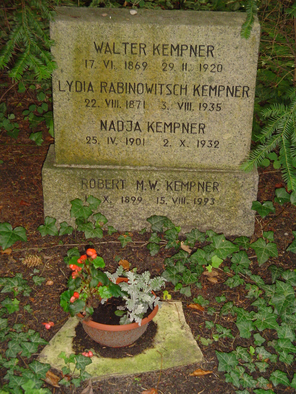 Parkfriedhof Lichterfelde, Grabstein der Familie Kempner